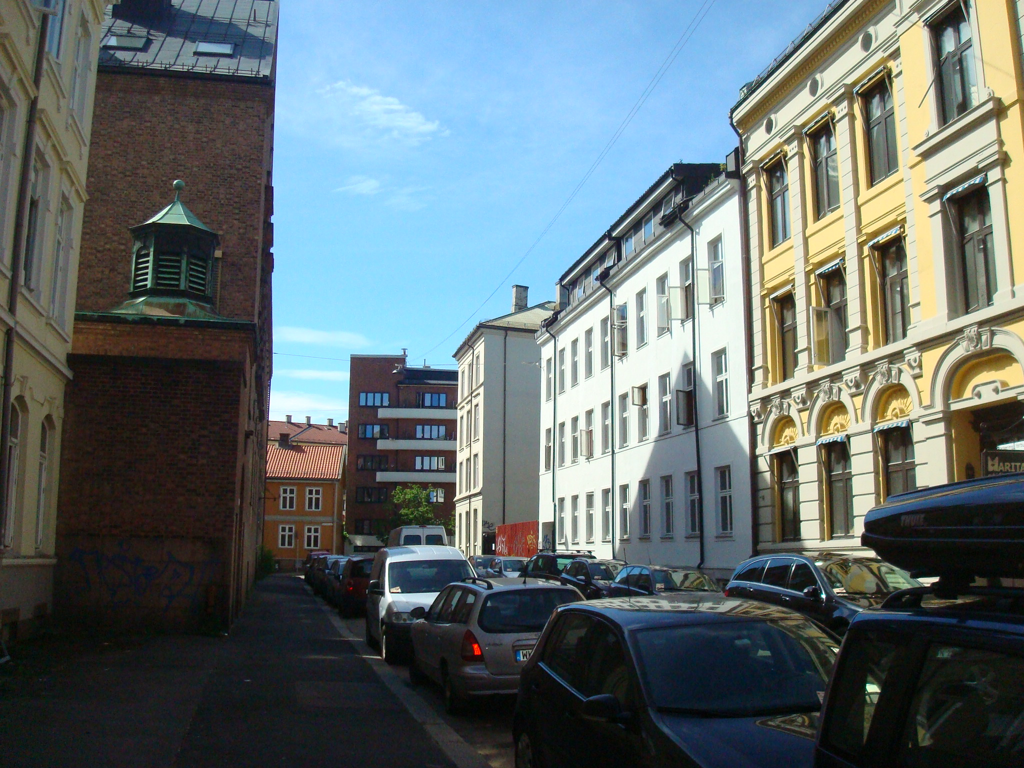 Holsts gate i Oslo (2014).